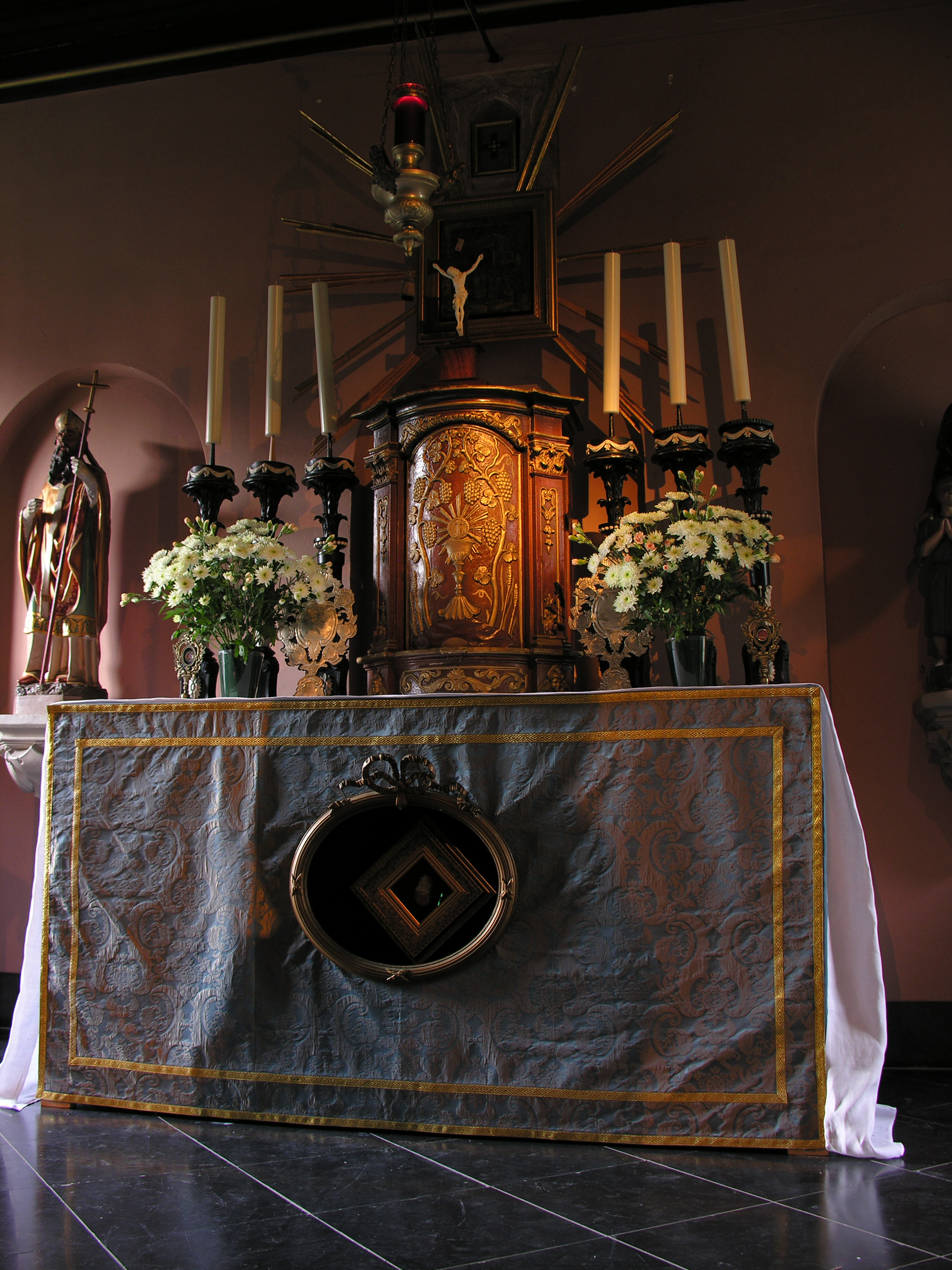 Hoogaltaar van de kluiskapel van Warfhuizen sinds ongeveer 2008